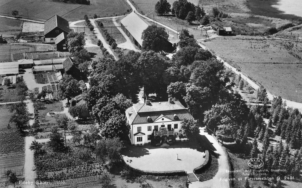 Edeby säteri från luften